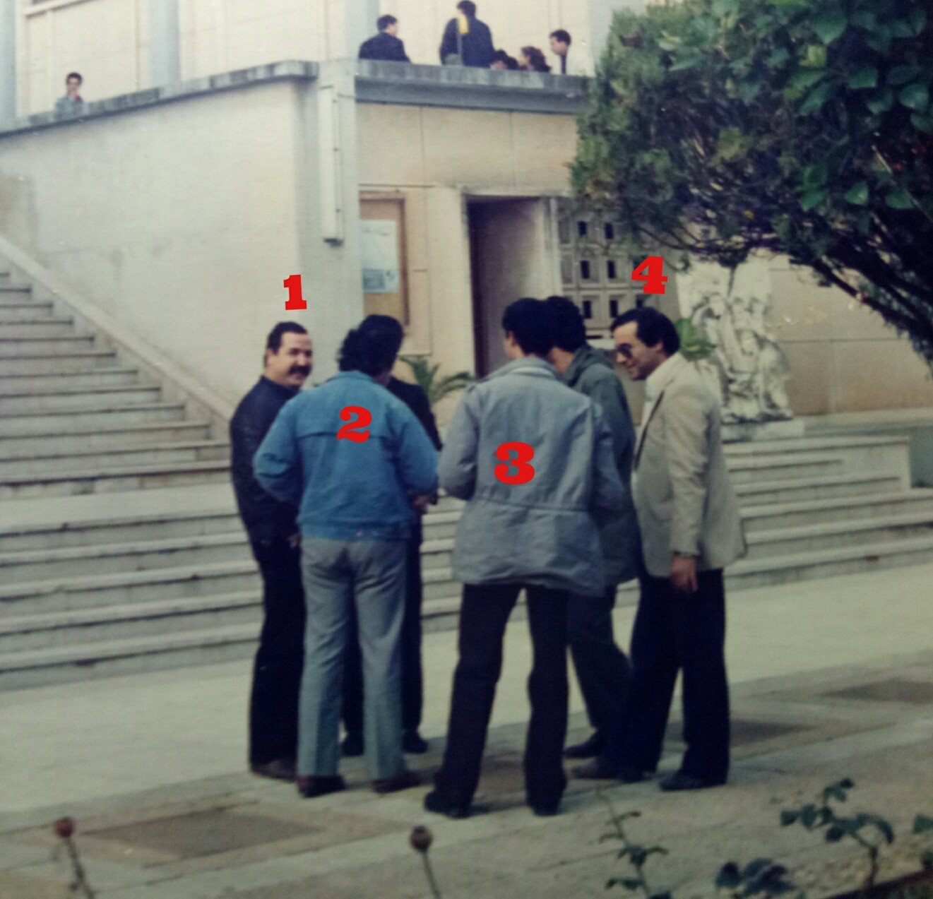 Numéro 1:madjid moula Numéro 2:khoudir boulaine Numero3:baaziz hammache Numéro4:Belkacem boufersaoui